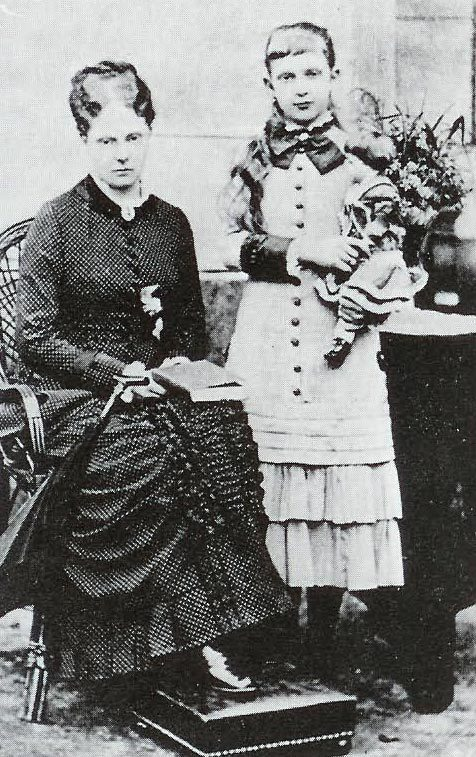 Foto genomen omstreeks 1853; afgebeeld zijn de zussen prinses Charlotte en prinses Alexandrine van Pruisen. Afbeelding komt in meerdere publicaties voor. Deze versie gevonden op alwaar het zonder auteursrechten gekopieerd mag worden.